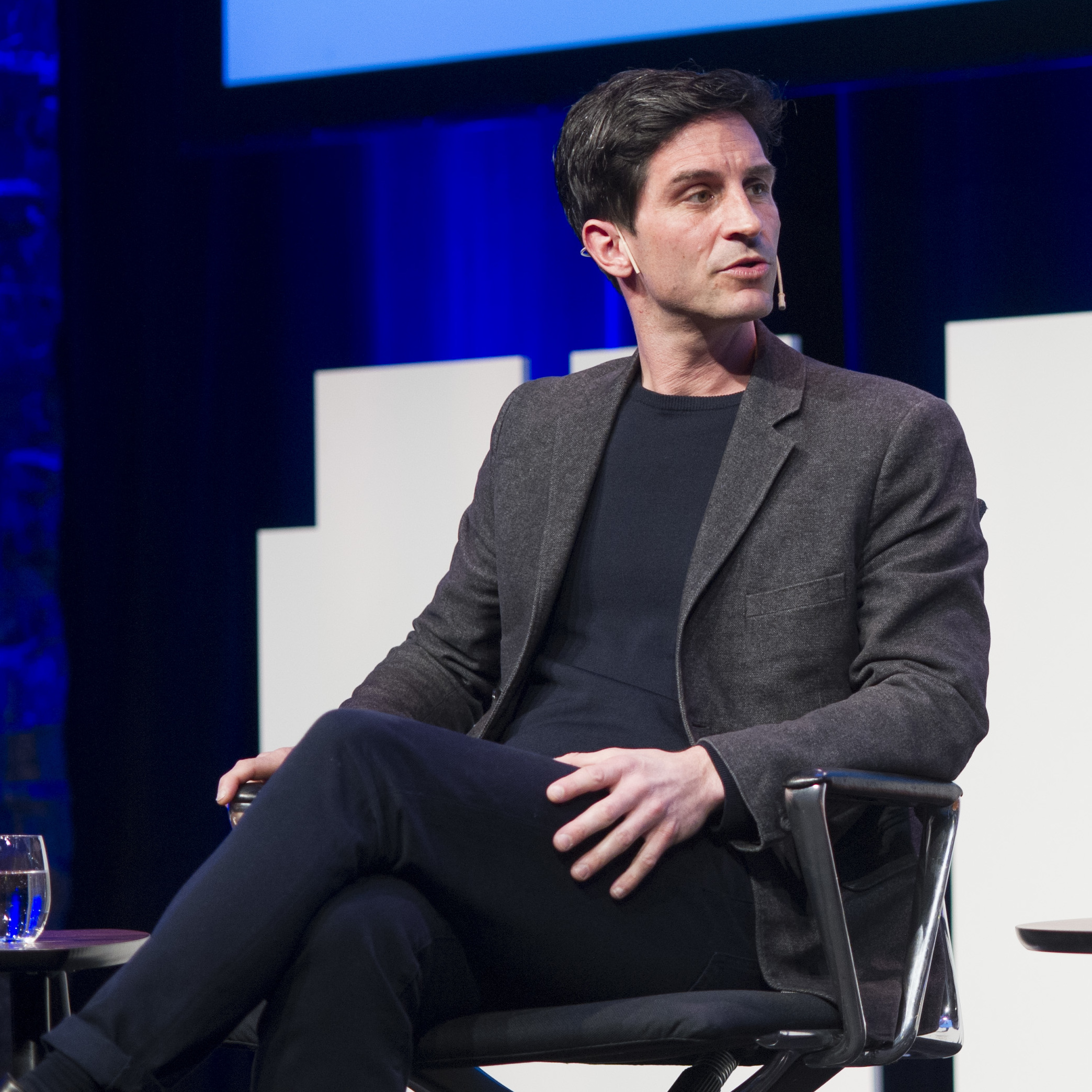 Christoph Bach, Petter S. Rosenlund og John M. Jacobsen